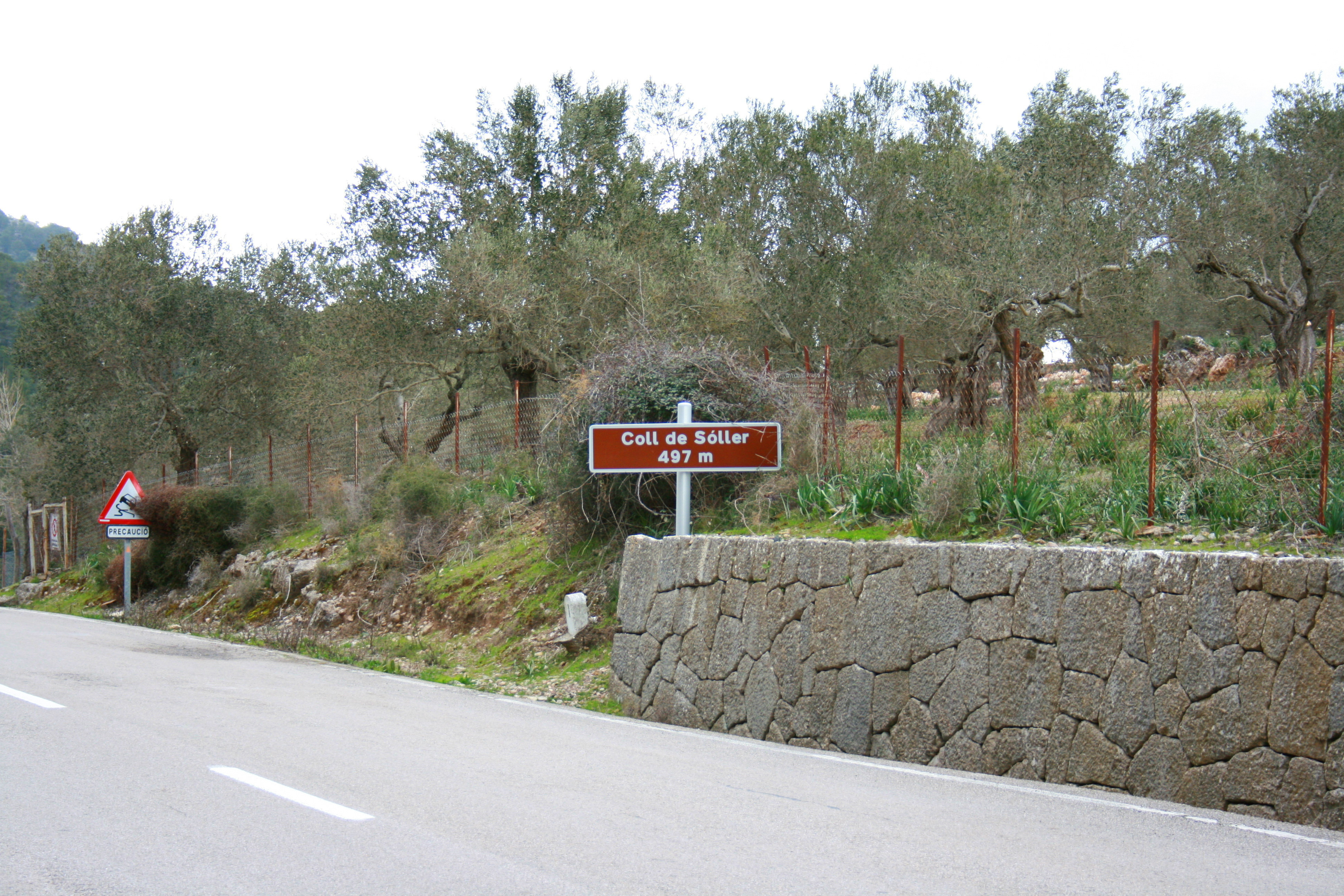 Coll de Sóller in Sóller, Mallorca